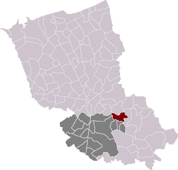 Locatie gemeente Kaaster in arrondissement Duinkerke. Zelfgemaakt. Location of Caëstre municipality in the arrondissement of Dunkirk. Self made. Localisation de la commune de Caëstre dans l'arrondissement de Dunkerque. Fait moi-même.